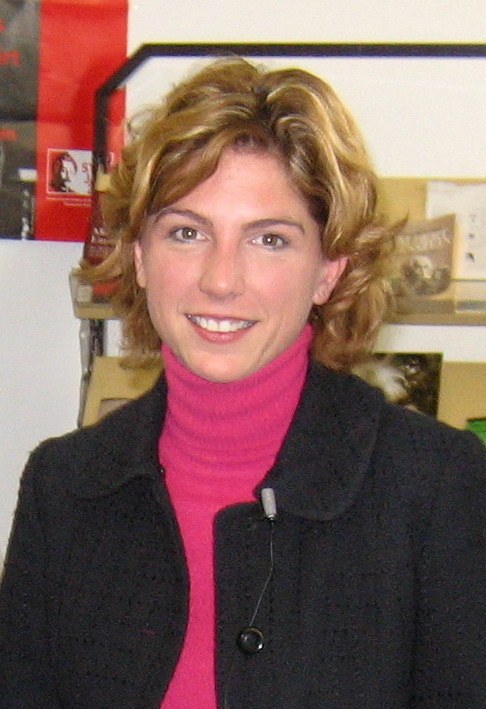 Sabine Bätzing, visit at the CJD Christophorusschule Königswinter